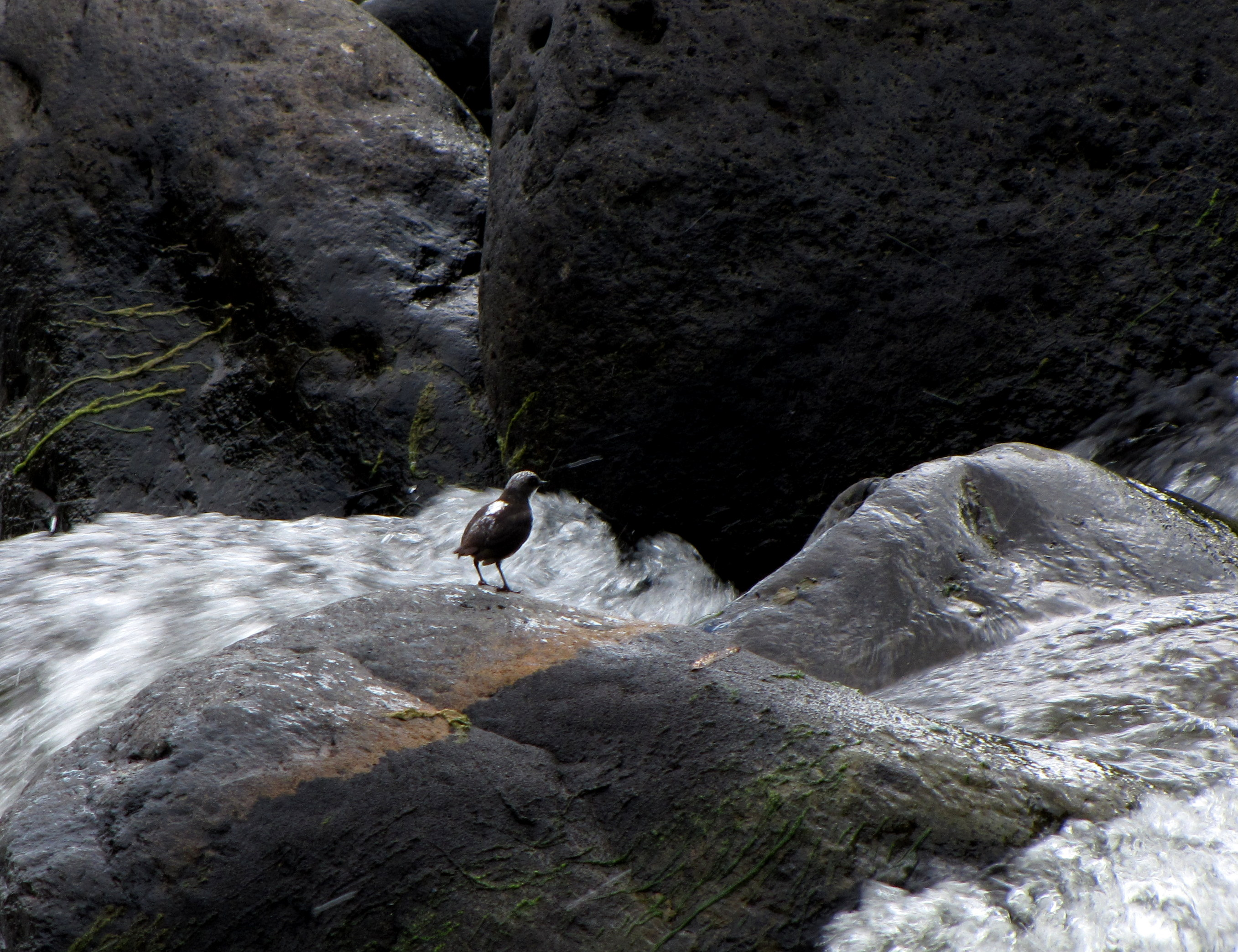 Cinclus leucocephalus (Mirlo acuático)